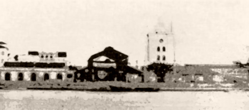 Arsenal da Marinha de Pernambuco no ano de 1865.